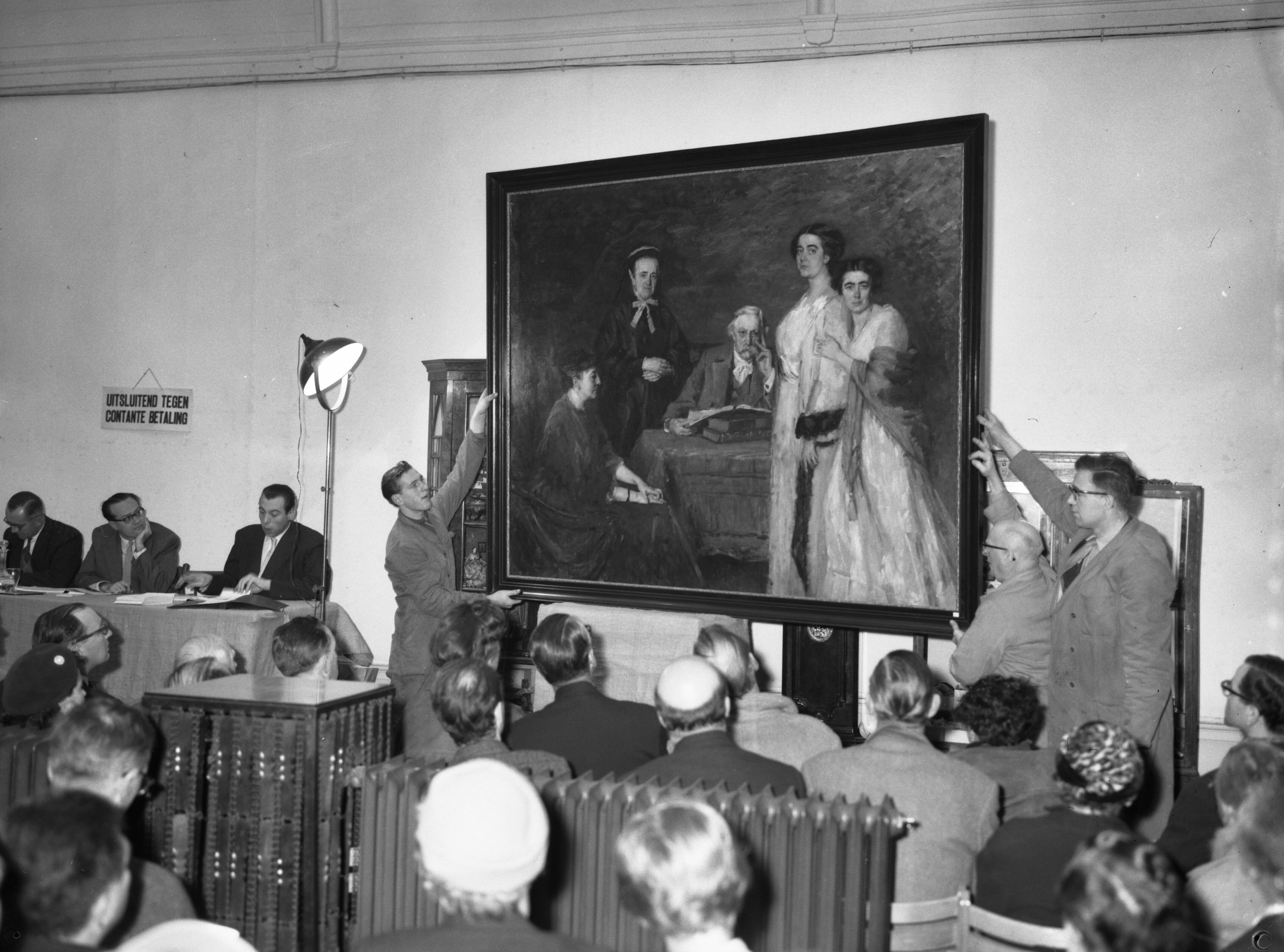 Collectie / Archief : Fotocollectie Anefo Reportage / Serie : [ onbekend ] Beschrijving : Veiling nalatenschap van Lizzy Ansingh door Paul Brand in Arti et Amicitiae te Amsterdam Datum : 1 maart 1960 Trefwoorden : schilderijen, veilingen Persoonsnaam : Ansingh, Lizzy, Brand, Paul Fotograaf : Rossem, Wim van / Anefo Auteursrechthebbende : Nationaal Archief Materiaalsoort : Negatief (zwart/wit) Nummer archiefinventaris : bekijk toegang 2.24.01.04 Bestanddeelnummer : 911-0584 Reacties Geplaatst door Maaike op 08 juni 2014 - 18:32. Locatie: Arti Plaats: Amsterdam, Noord-Holland Geplaatst door Kunstliefhebber op 06 januari 2017 - 19:14. NB. Familieportret geschilderd door Thérèse van Duyl-Schwartze, uit de nalatenschap van schilderes Lizzy Ansingh werd geveild en bracht hfl 500,- op.